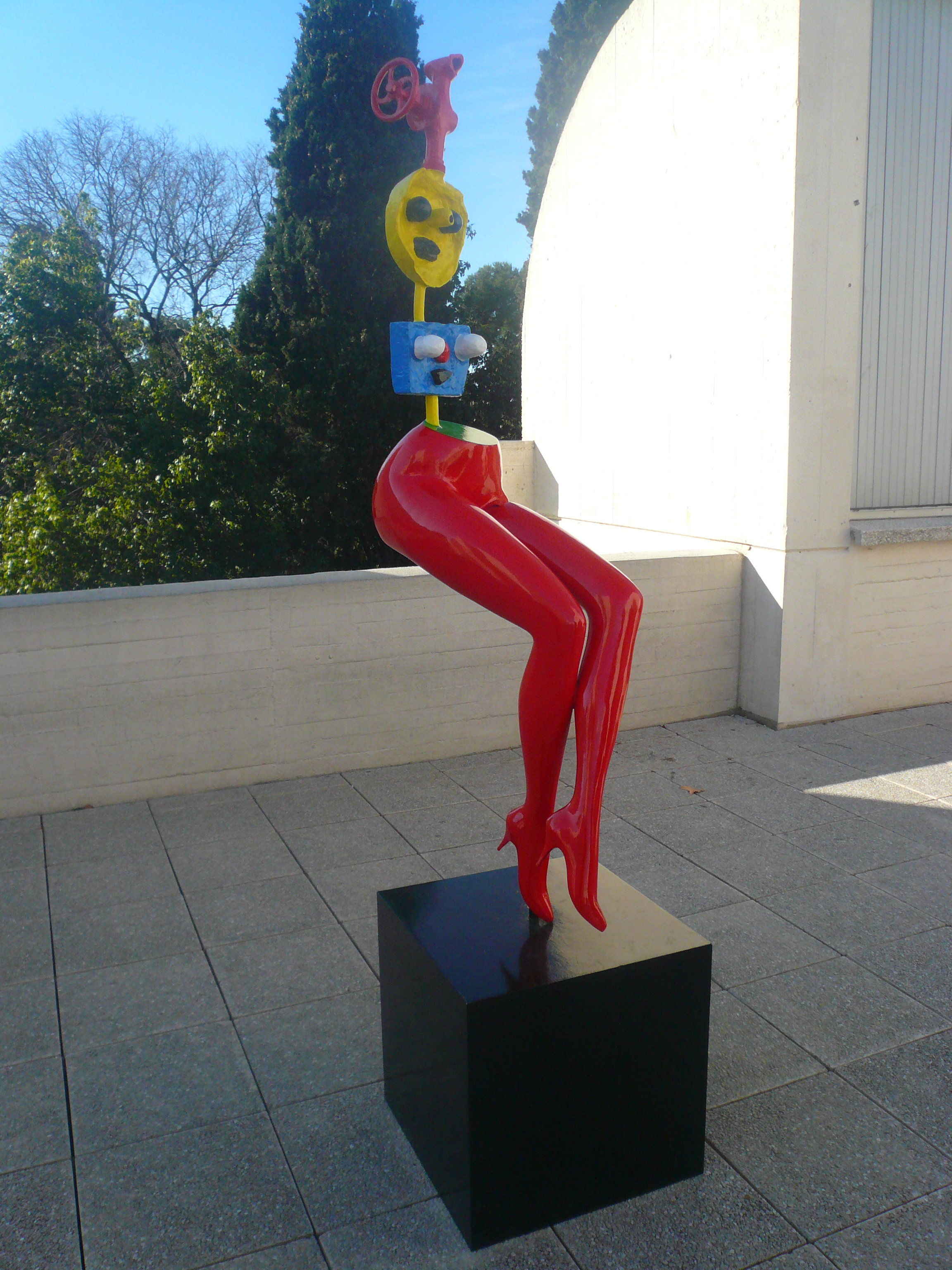 Fundació Miró (Barcelona) Object location41° 22′ 07″ N, 2° 09′ 36″ E